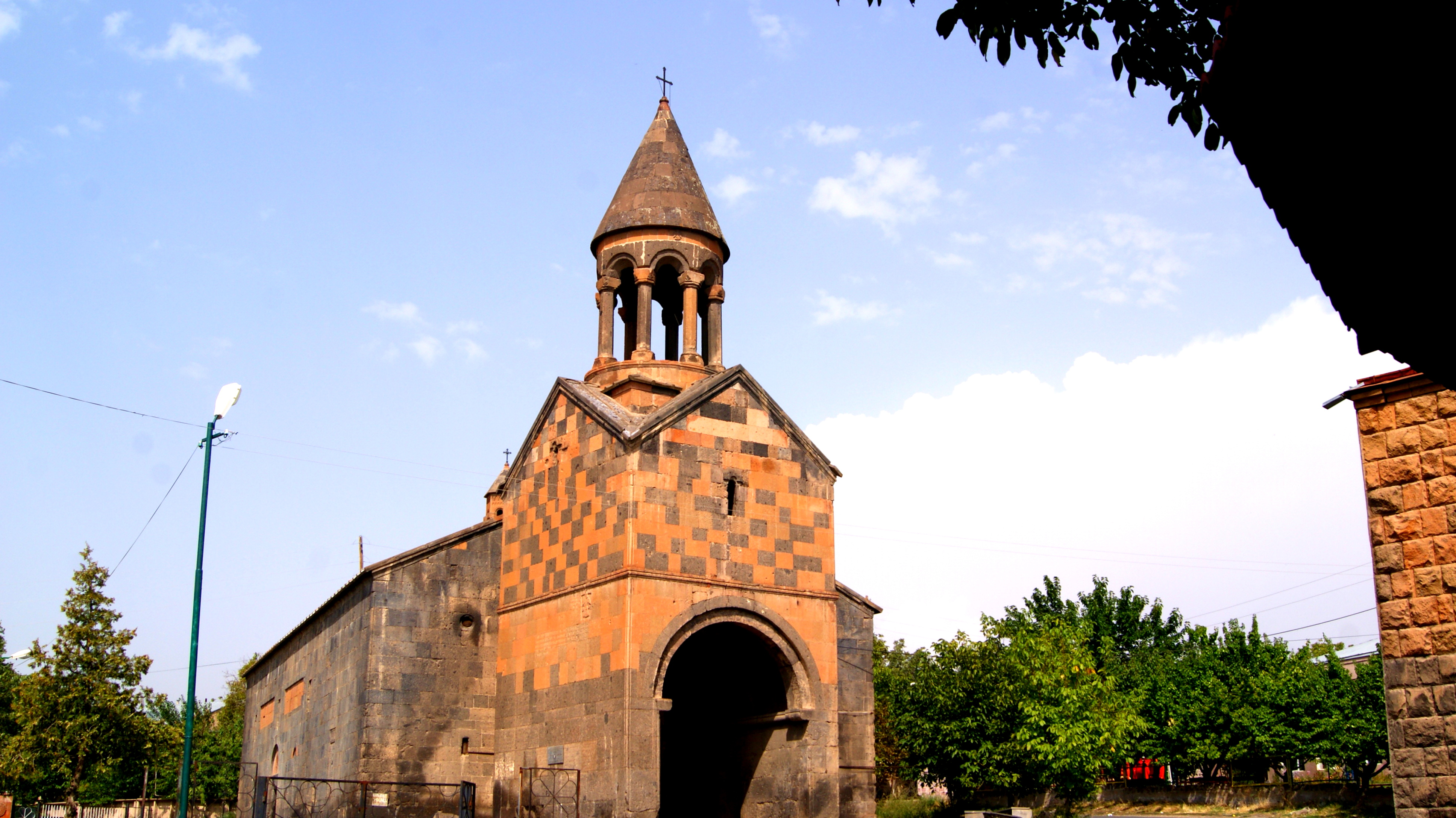 Եկեղեցի Սբ. Աստվածածին, Կարբի 58/9